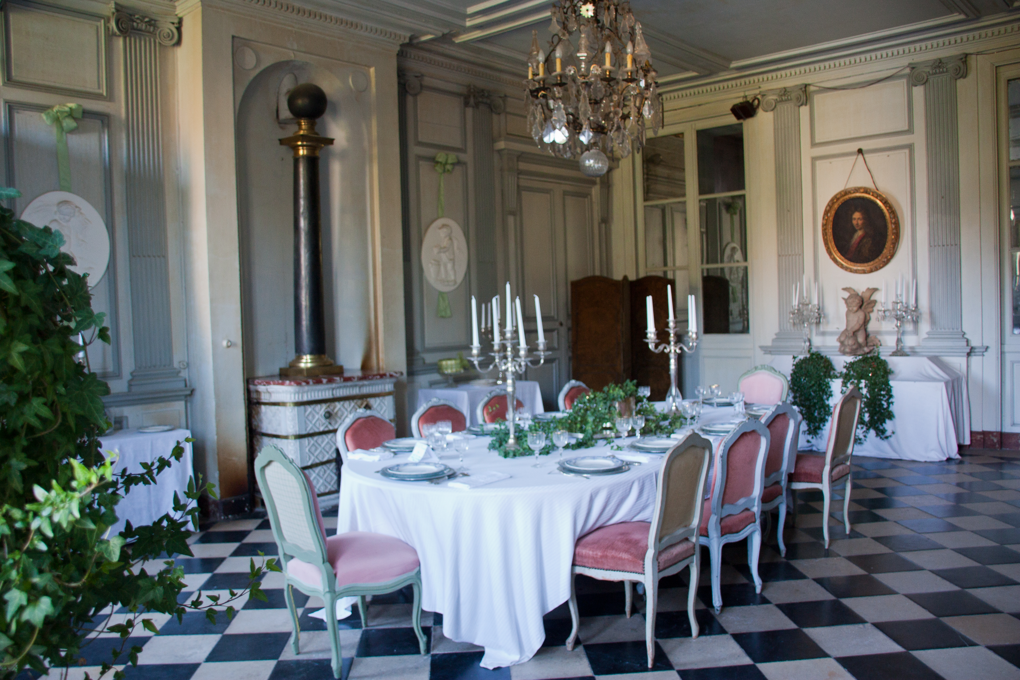 Château de la Ferté - La Ferté-Saint-Aubin, Loiret, France.